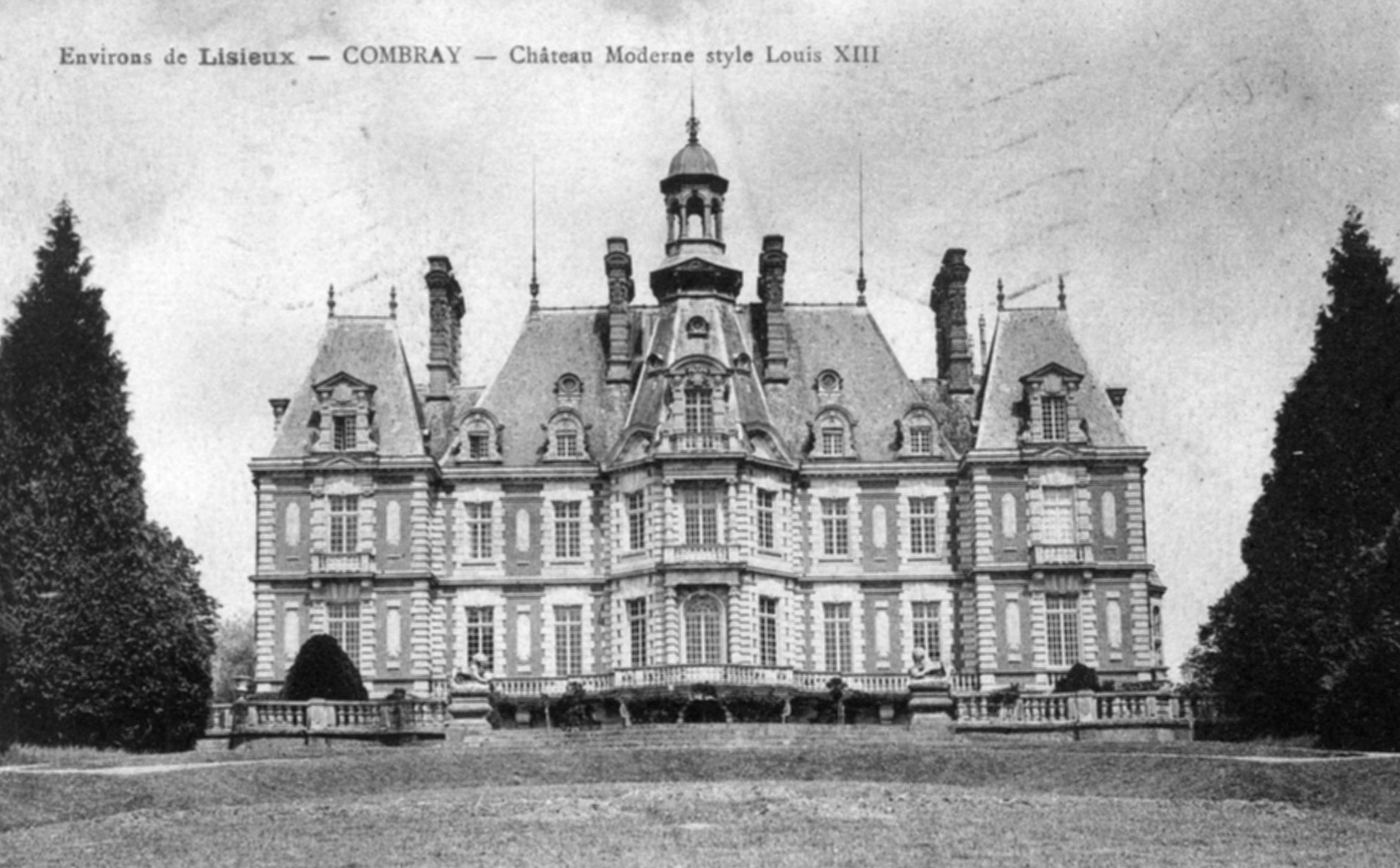 Environs de Lisieux. Combray. Château moderne style Louis XIII